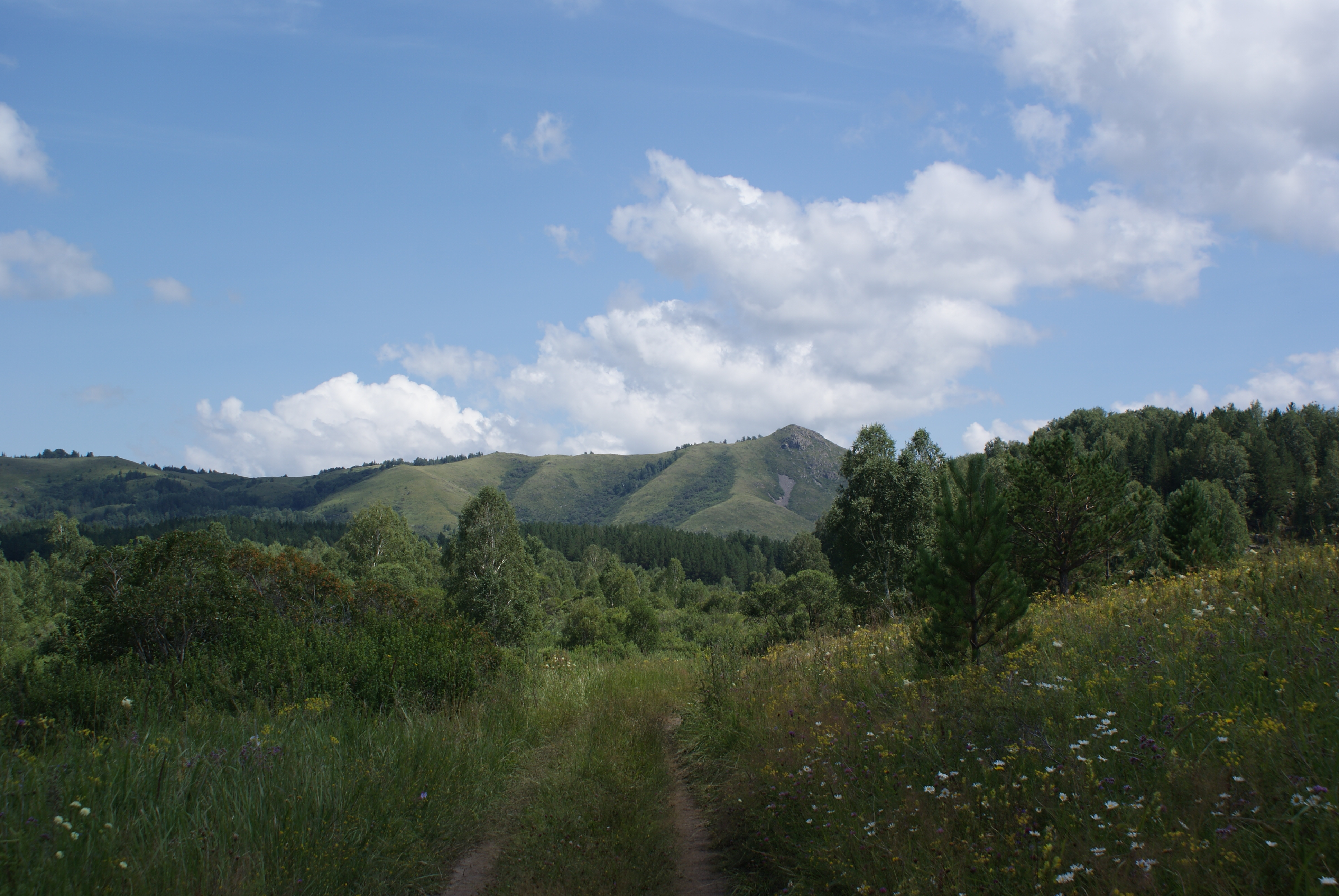 Kuryinsky District, Altai Krai, Russia